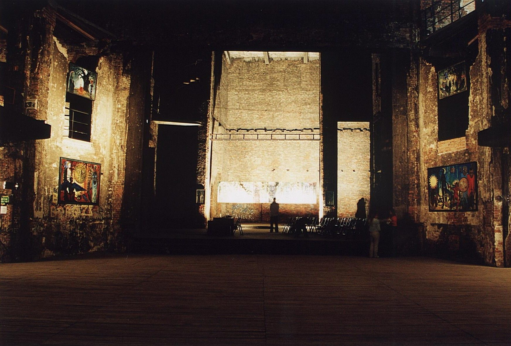 Ruiny Teatru Miejskiego, wzniesionego w 1890 r.; Gliwice, Aleja Przyjaźni